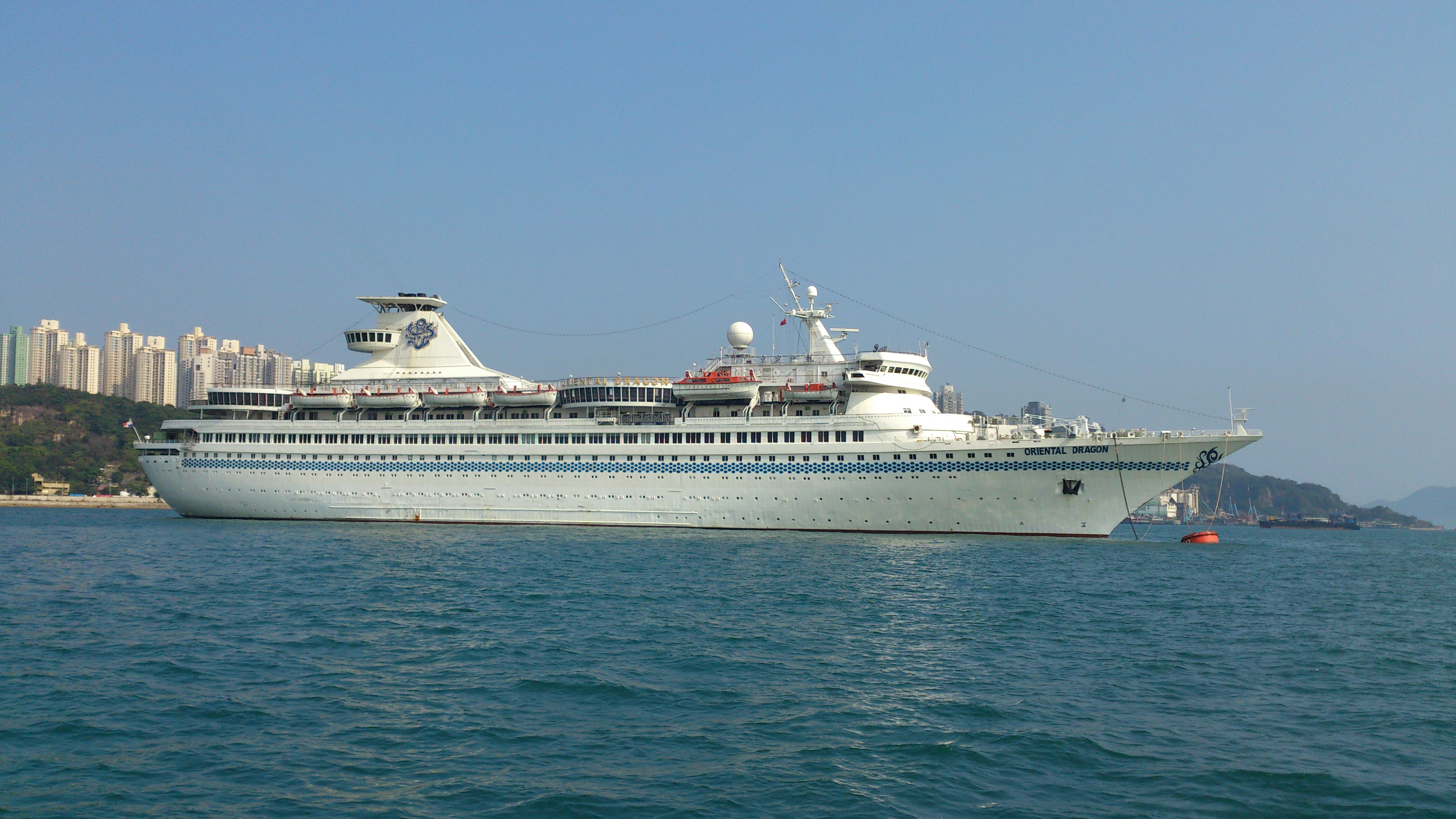 郵輪